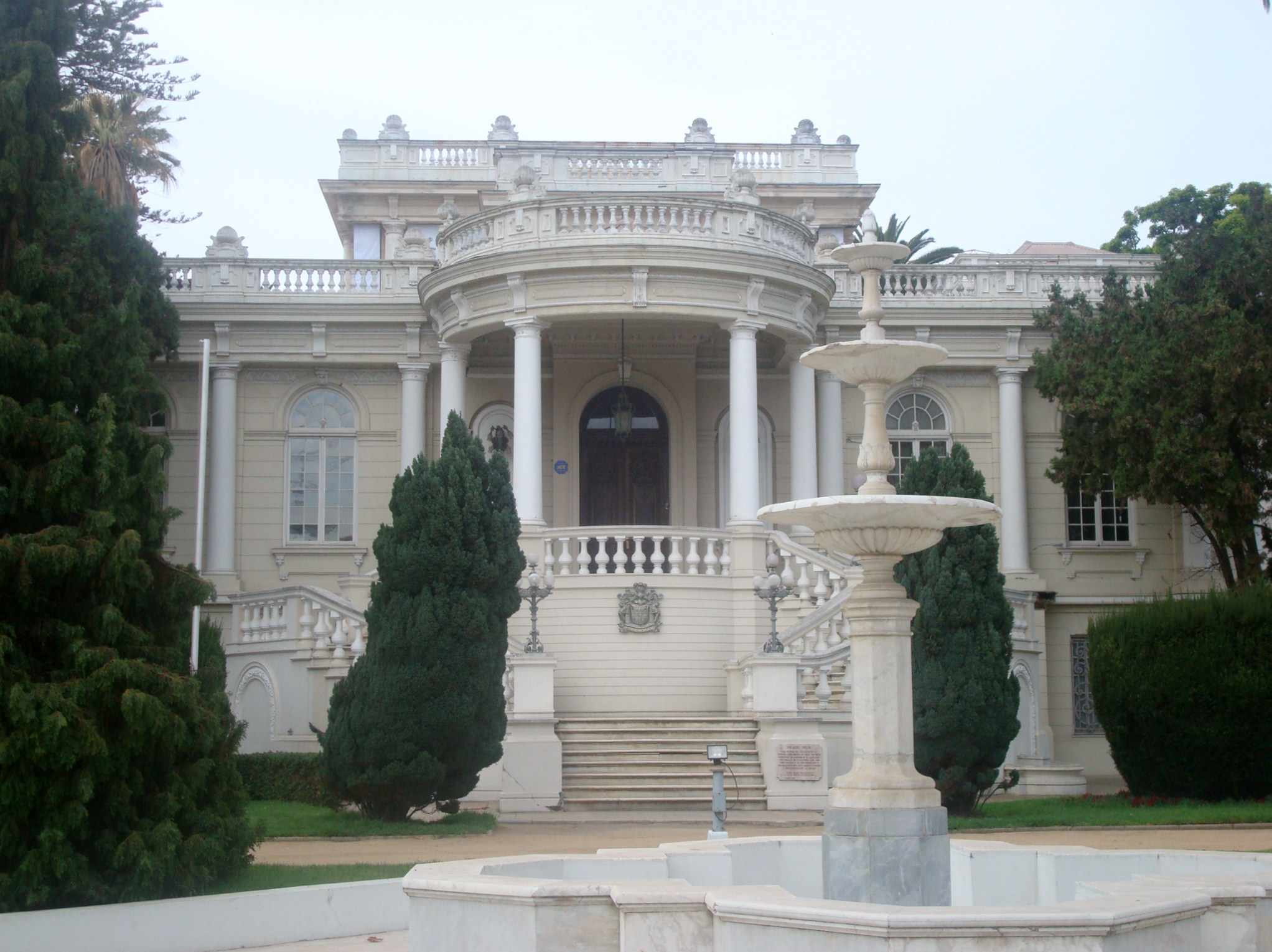 Palacio Rioja, Viña del Mar, Chile